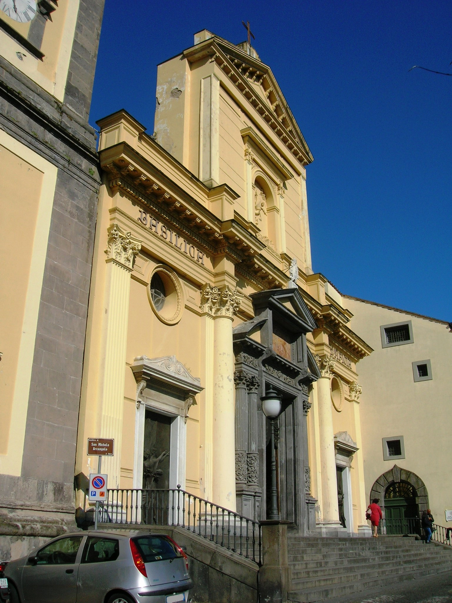 La basilica di San Michele Arcangelo a Piano di Sorrento